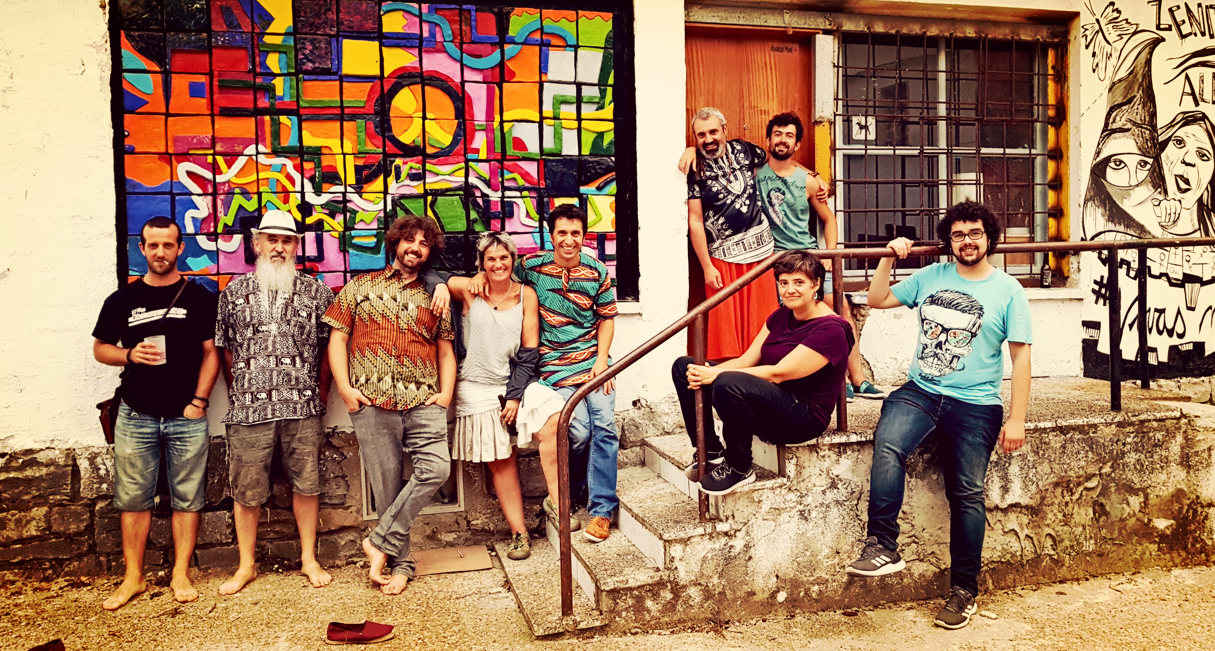 Makulu Ken taldeak Errekaleor errepublikan egindako argazkia 2018ko abuztuaren 29an